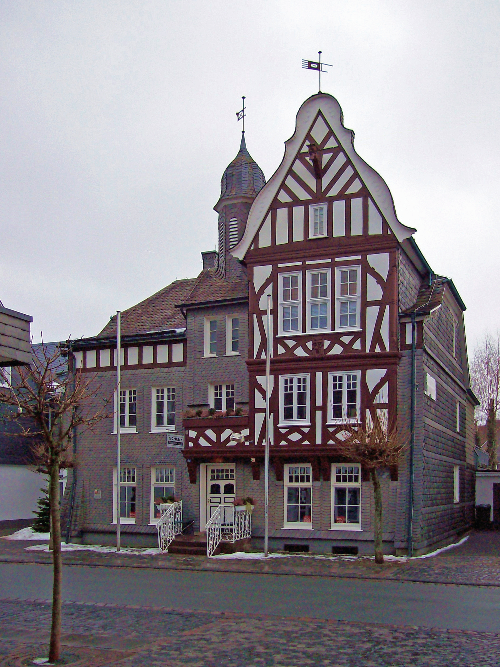 Denkmalgeschütztes Haus auf der Weststraße im historischen Stadtkern von Schmallenberg, Germany.